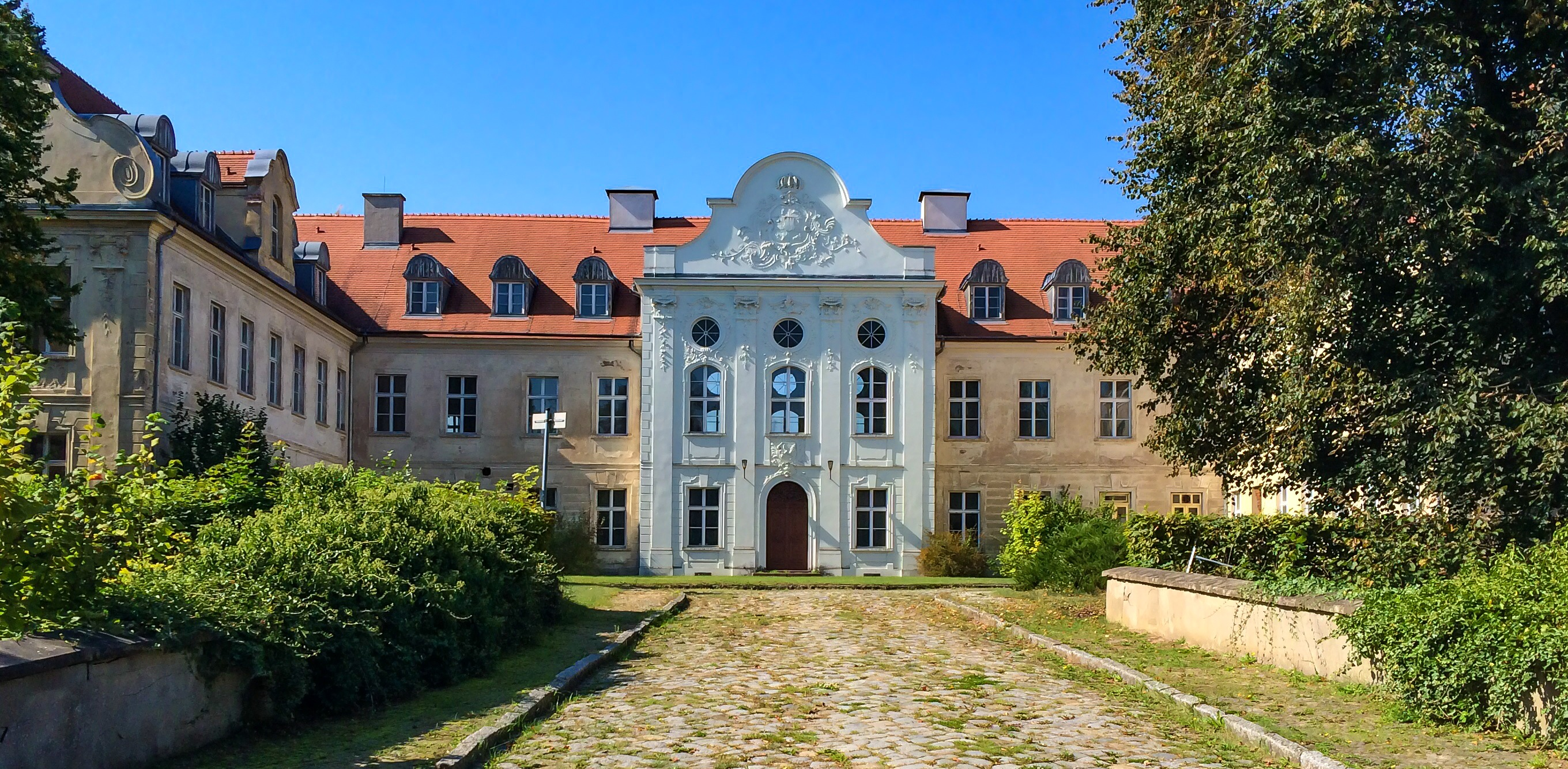 Schloss Fürstenberg in Fürstenberg/Havel, Landkreis Oberhavel (September 2014)